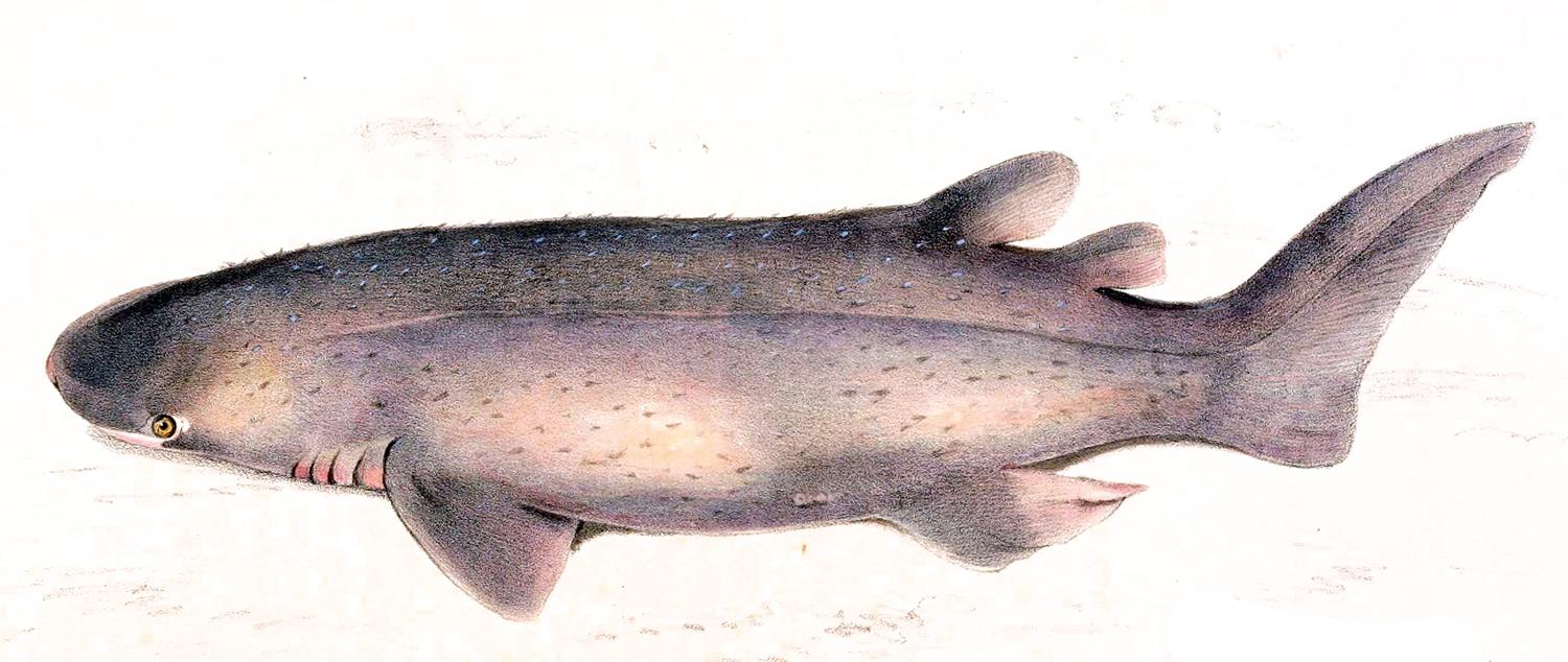 Echinorhinus brucus